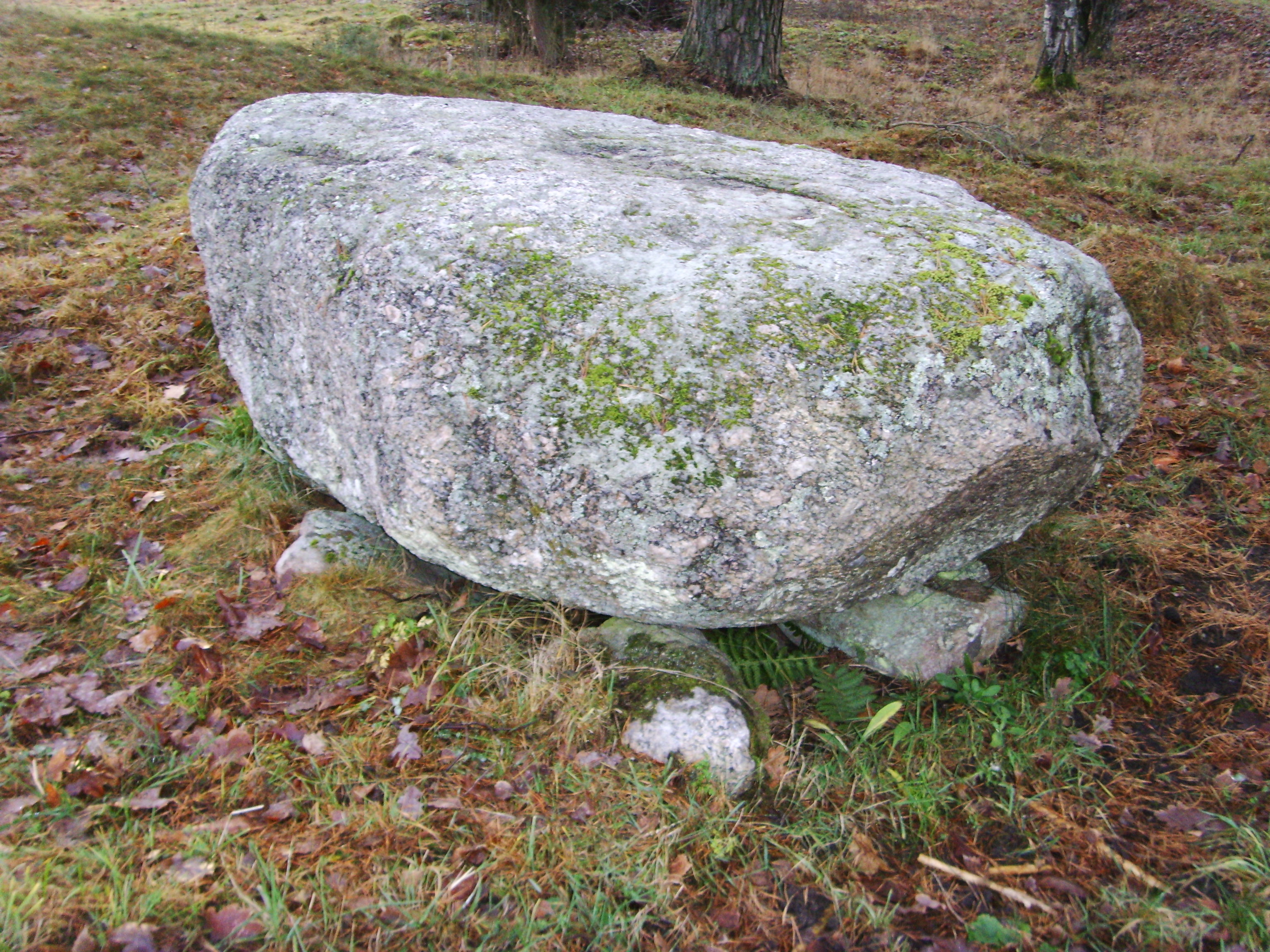 Fornlämning Borg 218:1, ca 500 meter väster om Borgs kyrka, i en hage vid den gamla landsvägen (Eriksgatan), är en offersten, som också med stor sannolikhet har använts såsom klangsten. Stenen är uppallad på tre st 0,4-0,5 m st stenar. N-änden verkar "tvärt" avhuggen. På ovansidan hittas 8 skålgropar. Samtliga av dessa är mer eller mindre ojämna och kantiga, dock är den största på södra ändan 7 cm i diam och 1 cm dj. Traditionen säger att "Vid offerstenen nära Borgs kyrka skola tre kungar eller krigare ha spisat frukost en gång och använt stenen som bord".